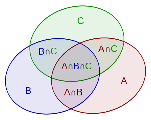 Принцип укључења и искључења приказан Веновим дијаграмом са три скупа